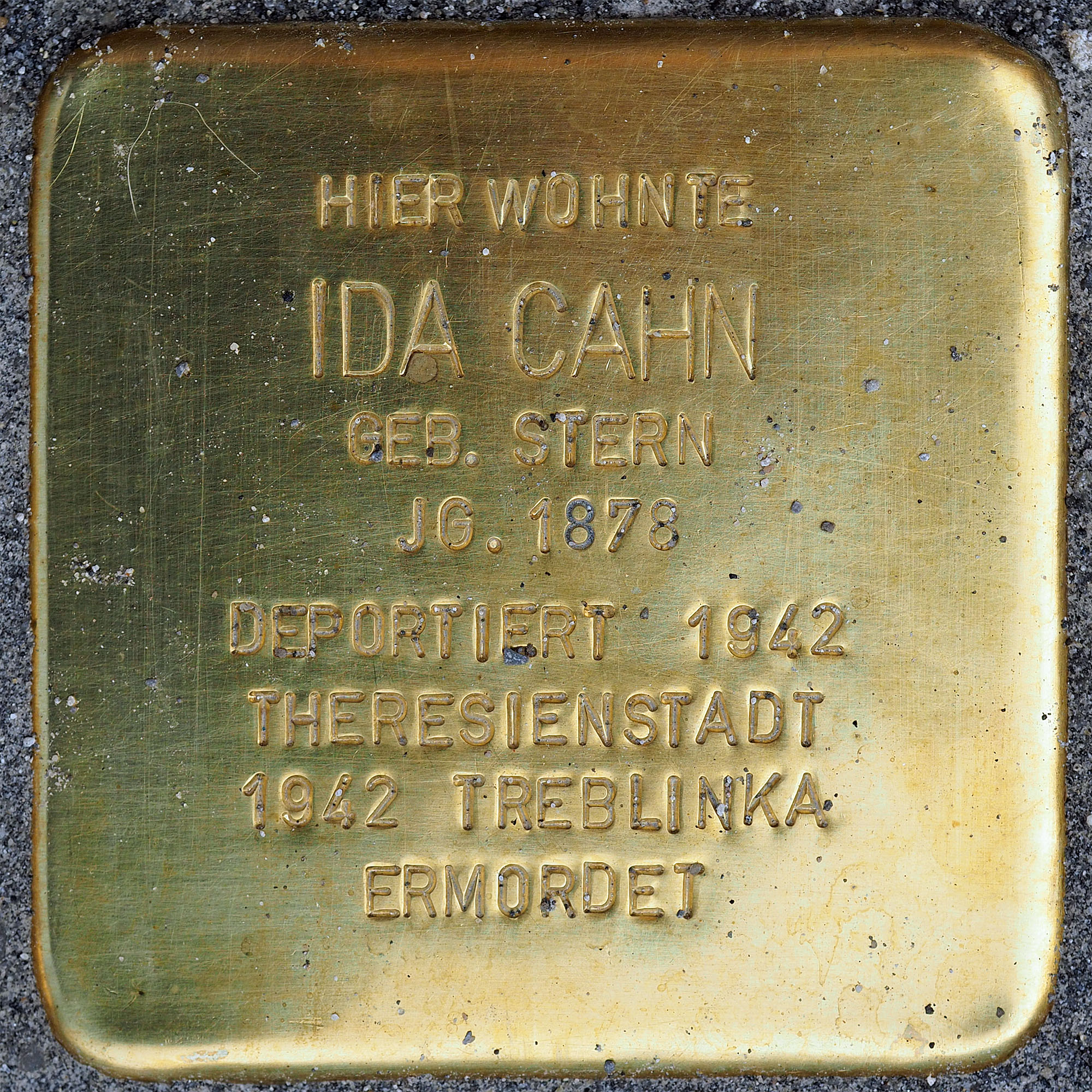 Stolpersteine Schwalmtal: Ida Cahn